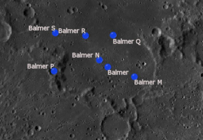 Cráter lunar Balmer. Cráteres satélite. (Imagen LRO)